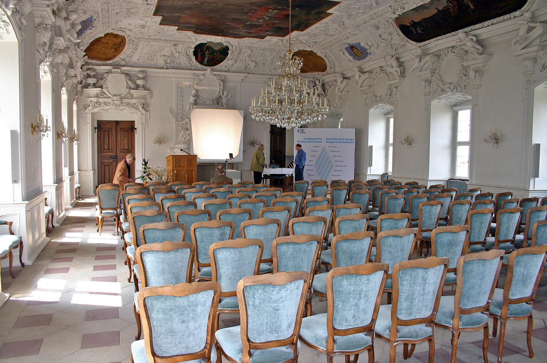 Saal im Kloster Banz Foto: Canon EOS 300D